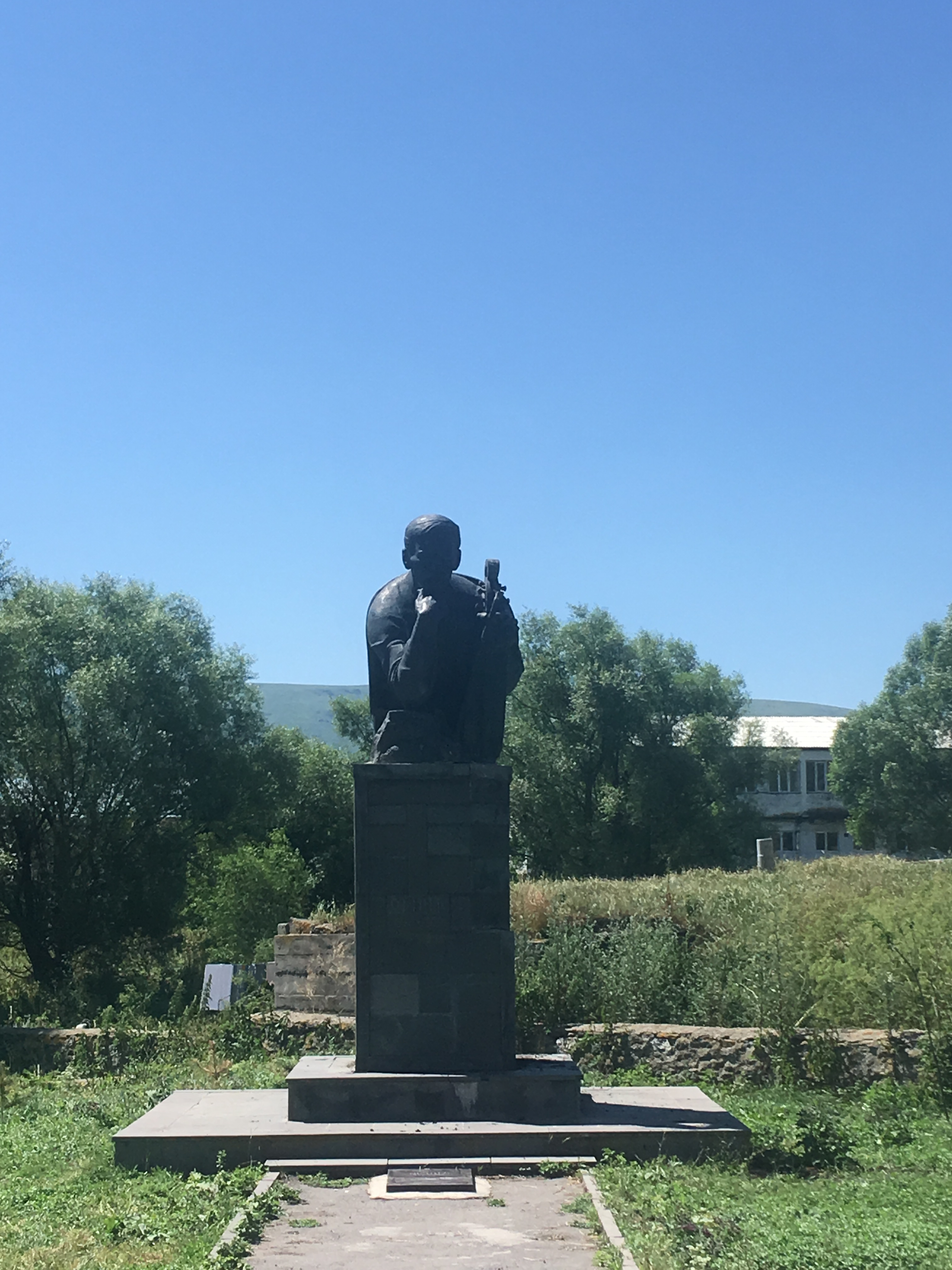 Ջիվանու հուշարձանը Կարծախում, Ջավախք